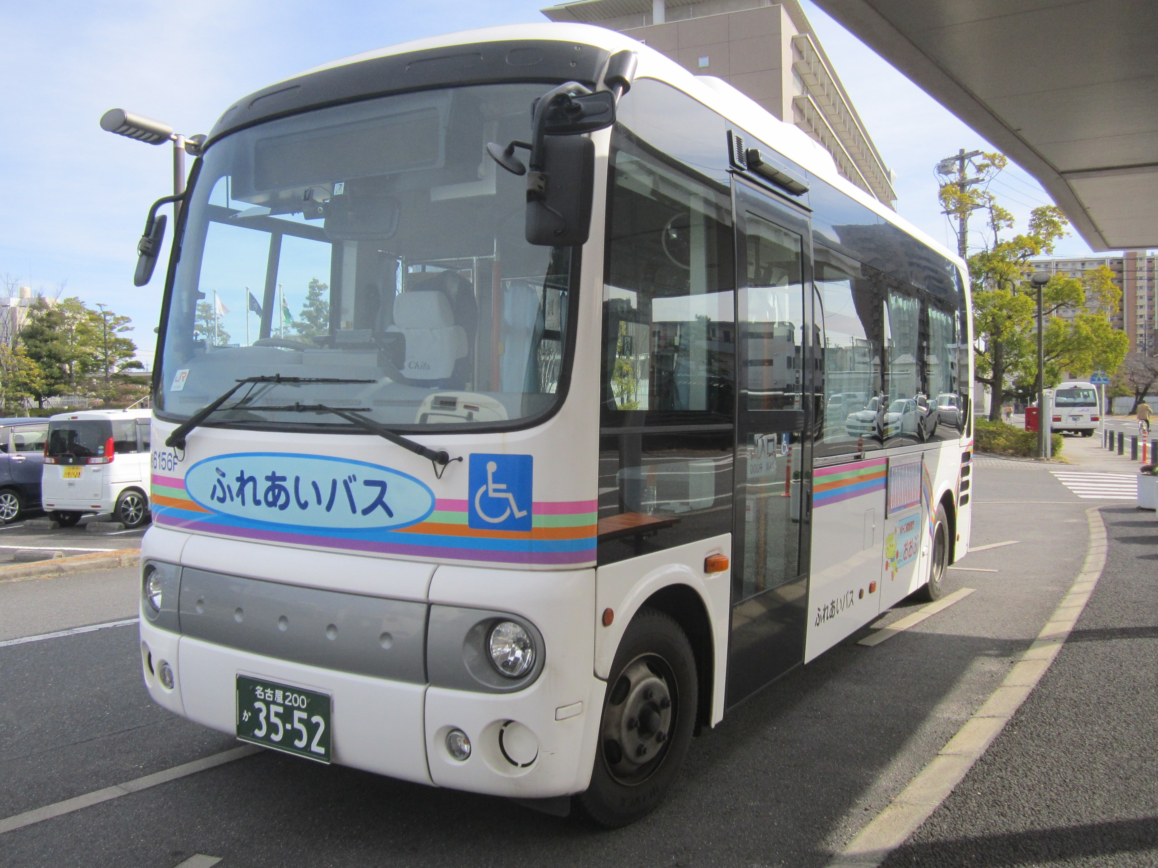 大府市役所付近に停車中の大府市循環バス「ふれあいバス」